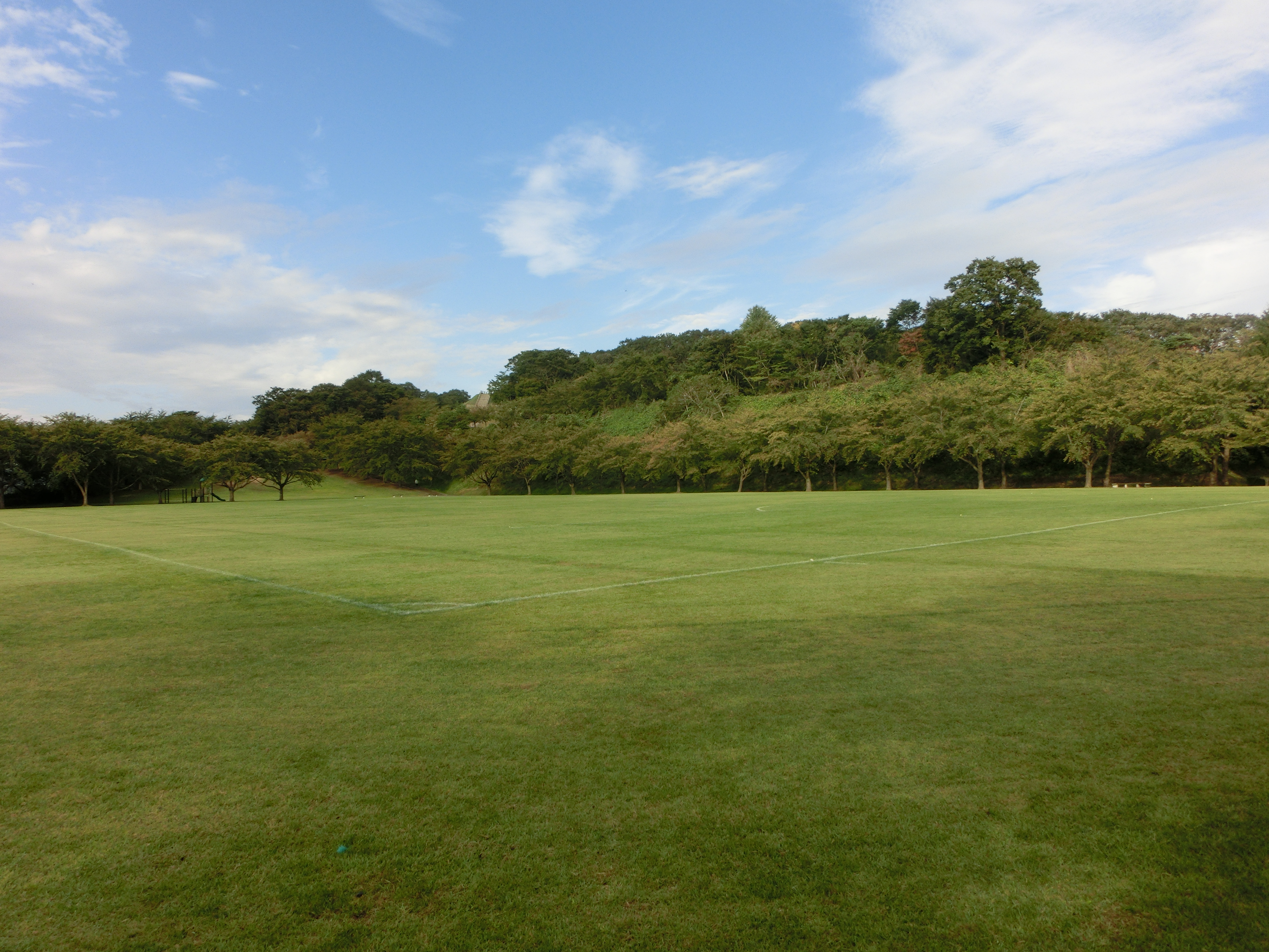 南部山健康公園多目的広場